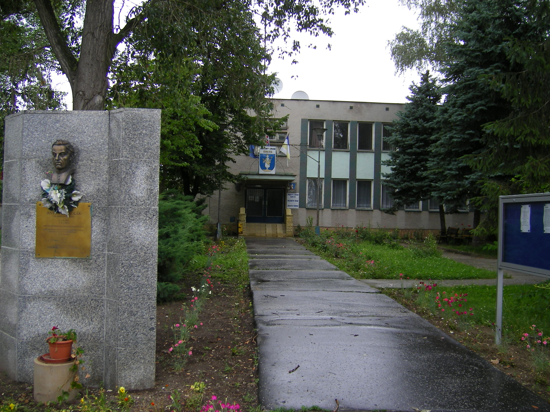 Kolta (NZ) municipal building